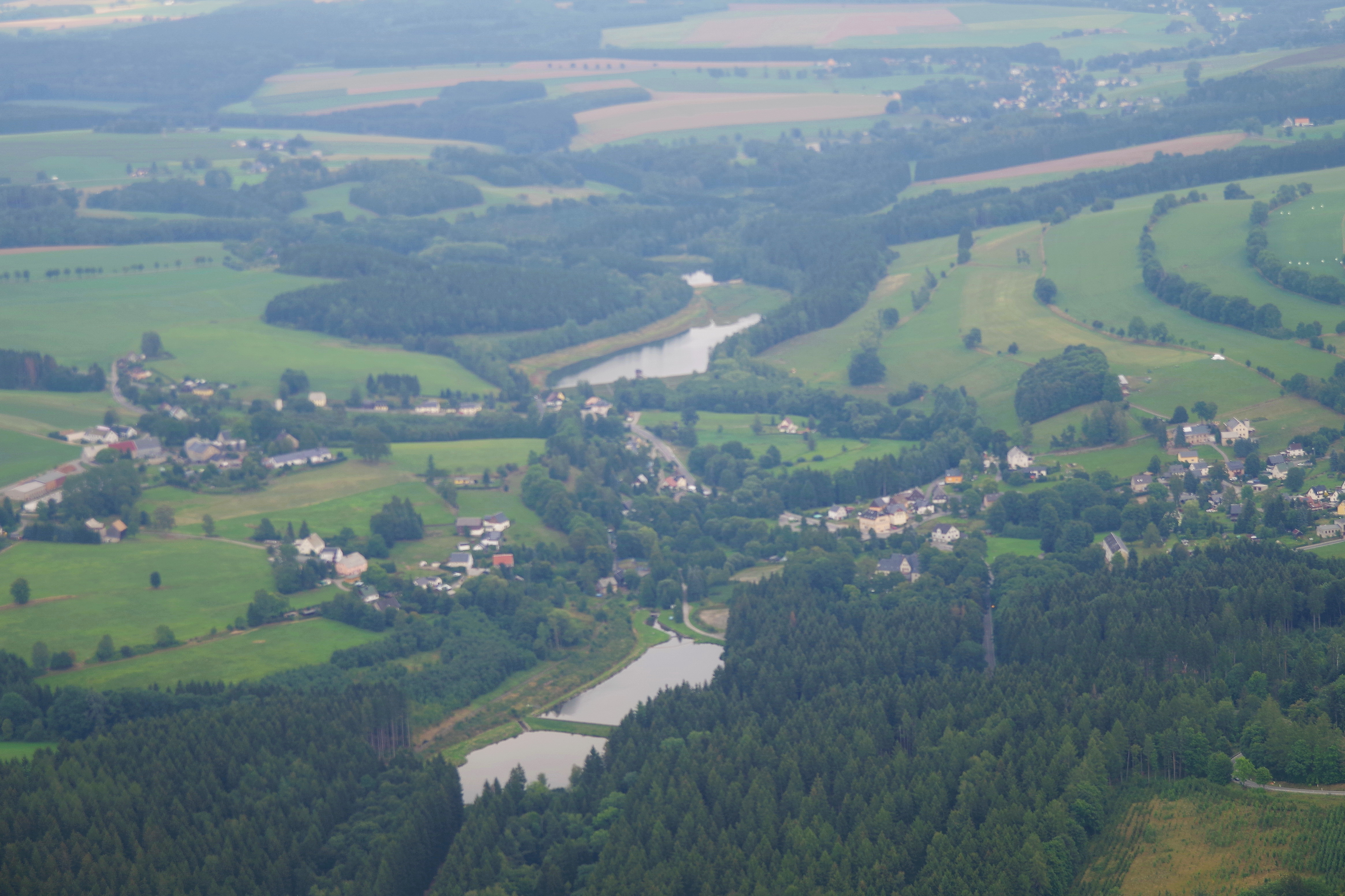 Vorsperre Forchheim (hinten), zwei Vorbecken Haselbach der Talsperre Saidenbach (vorn)